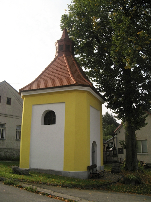 Kaple svatého Jana Nepomuckého, náves, Bednáreček.